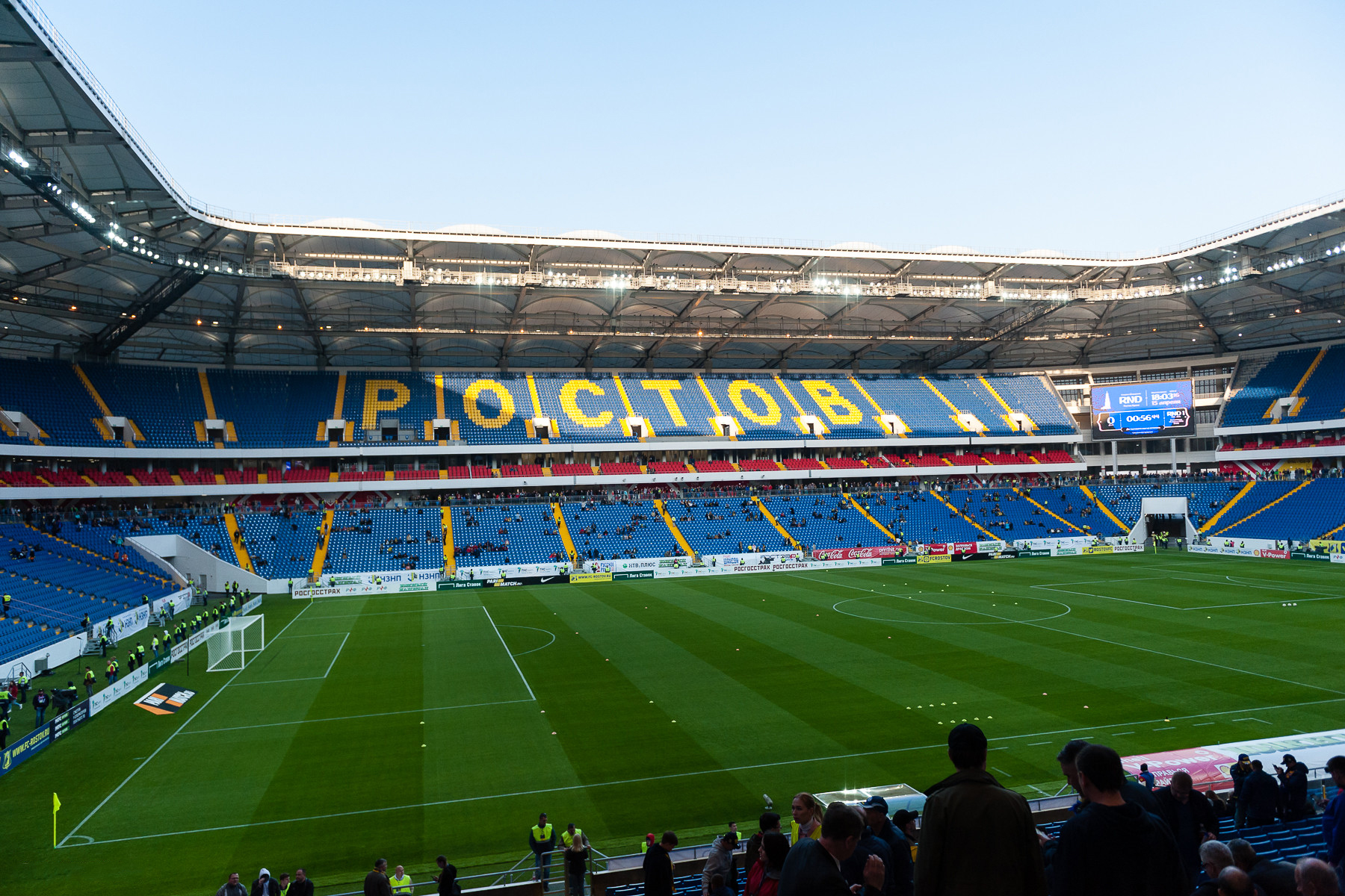 «Ростов» провел первый матч на новой арене